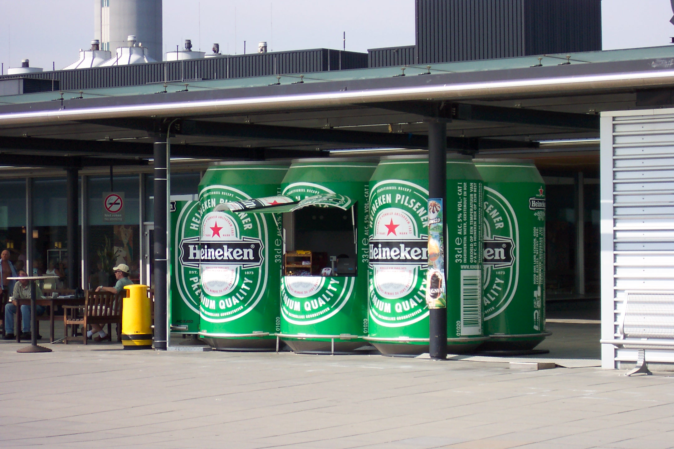 Flughafen Schiphol, Amsterdam, Niederlande